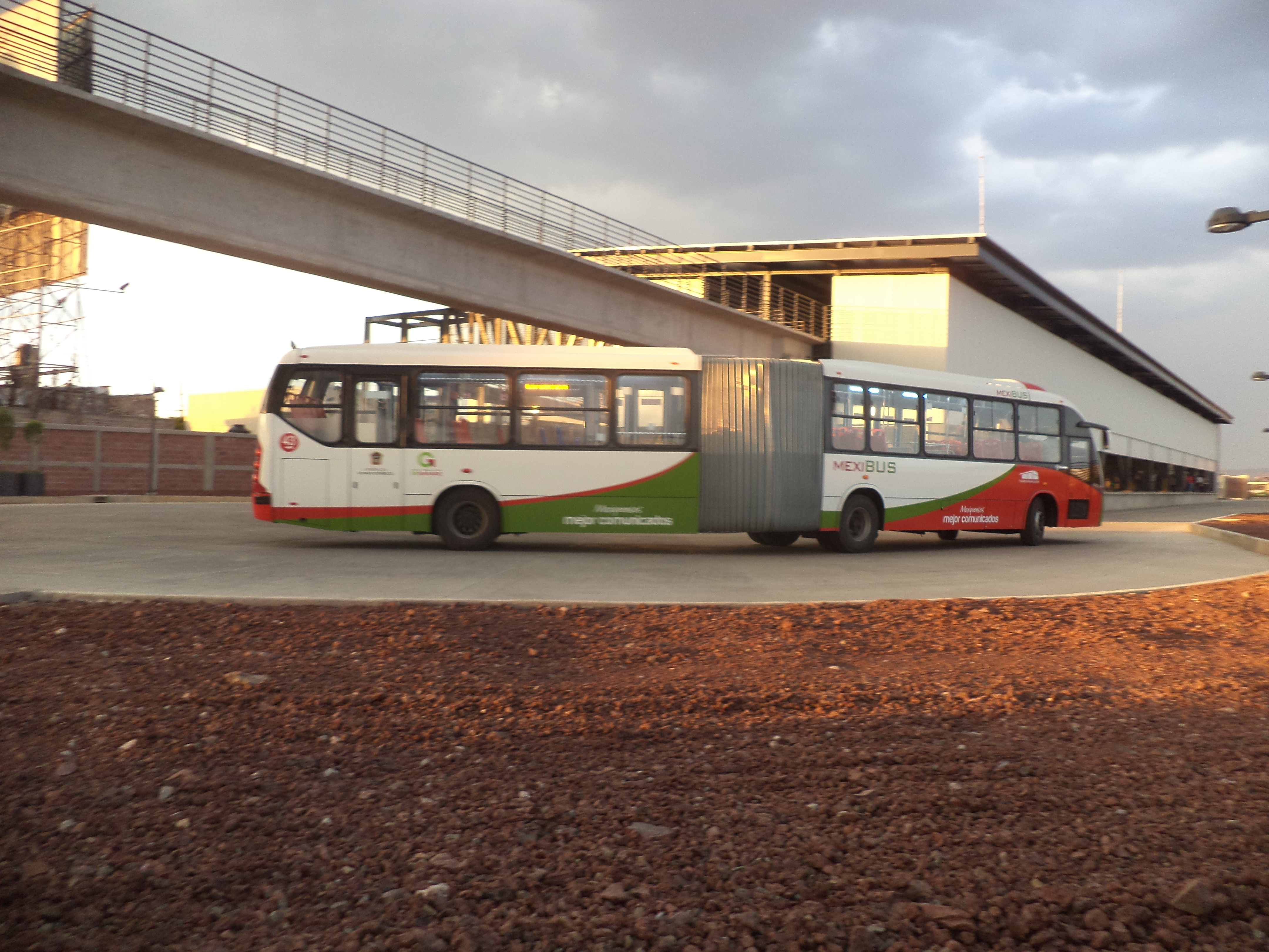 Autobus articulado del Mexibus línea 2